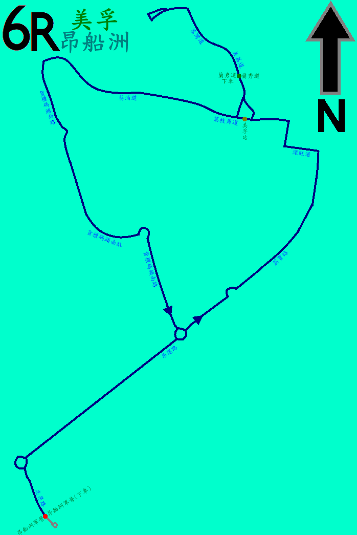 中文（香港）: 九龍巴士6R線的走線圖